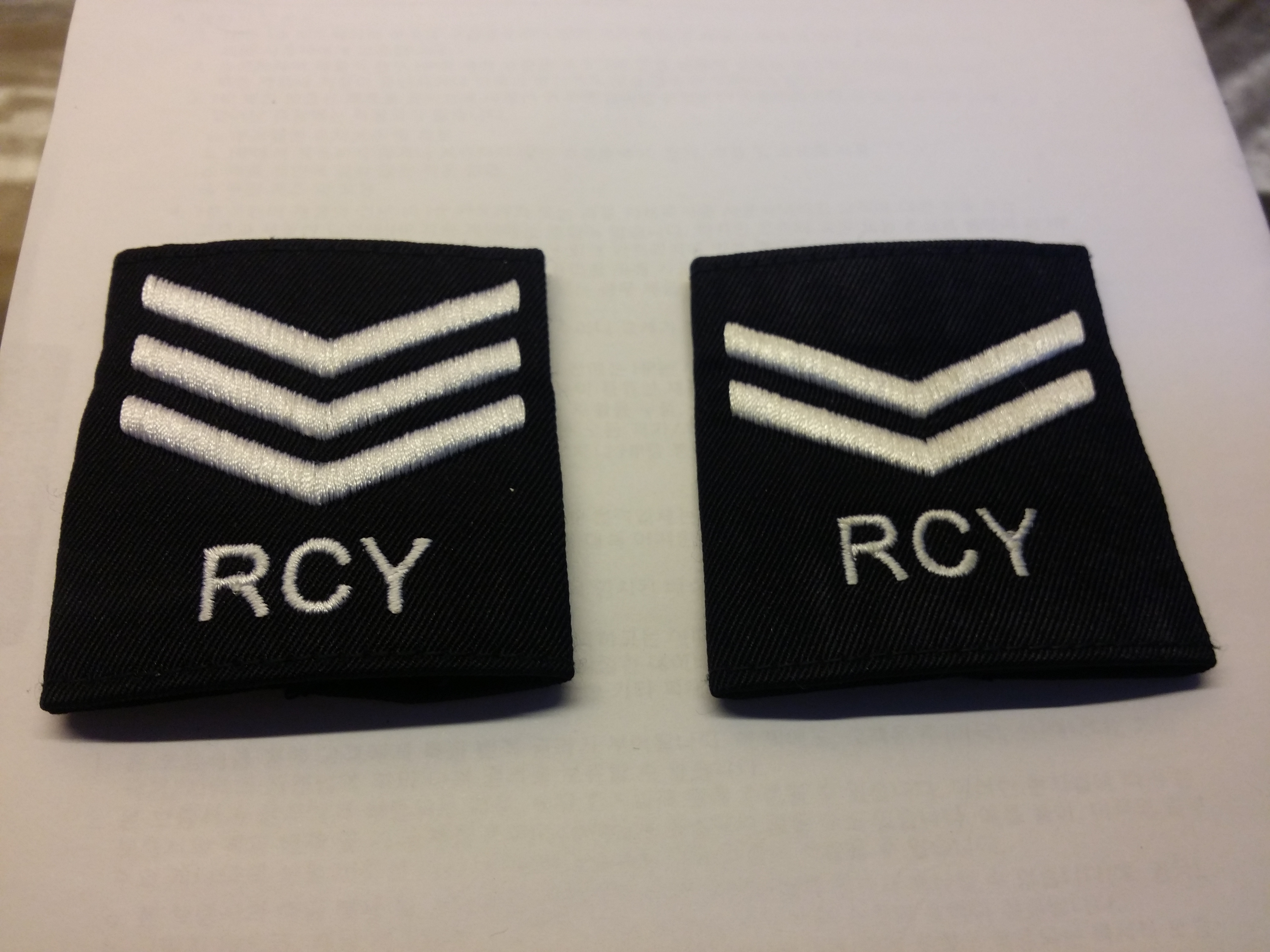 團委員肩章